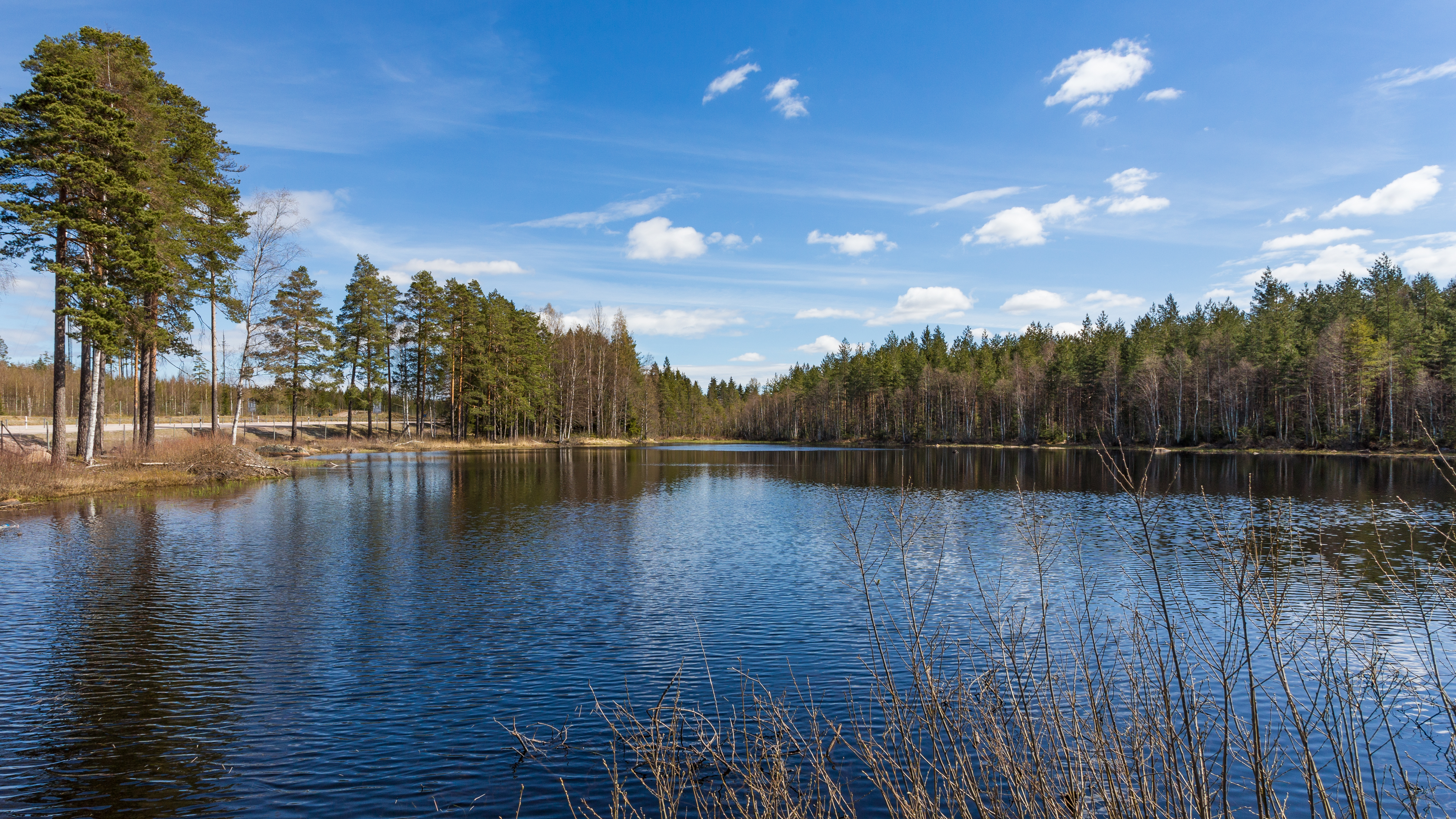 Käringflytet, Norbergs kommun, Västmanlands län, Sverige.